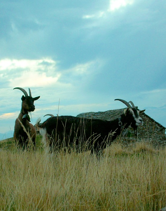 Berggeiten op Alpe Gesero